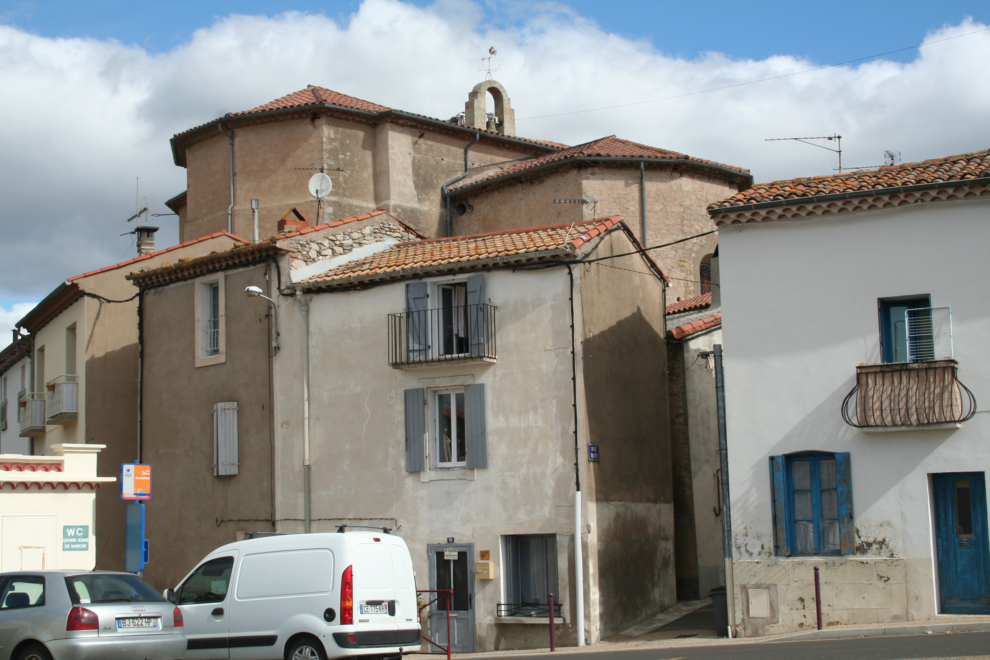 Maureilhan (Hérault) - église Saint-Baudile - vue générale